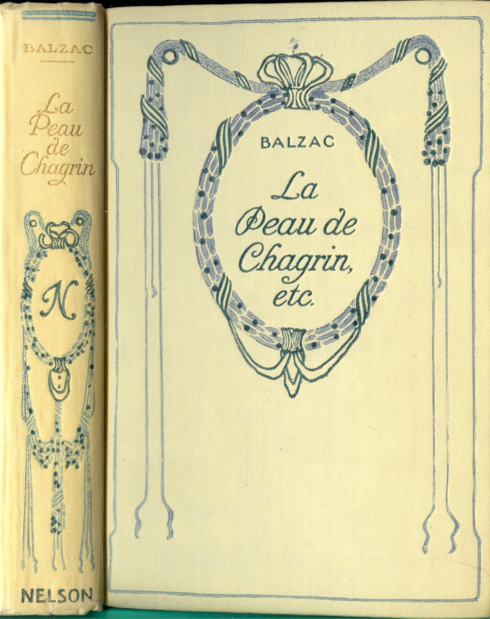 Cartonnage du premier ouvrage de la Grande collection française de Thomas Nelson Edition originale 1910